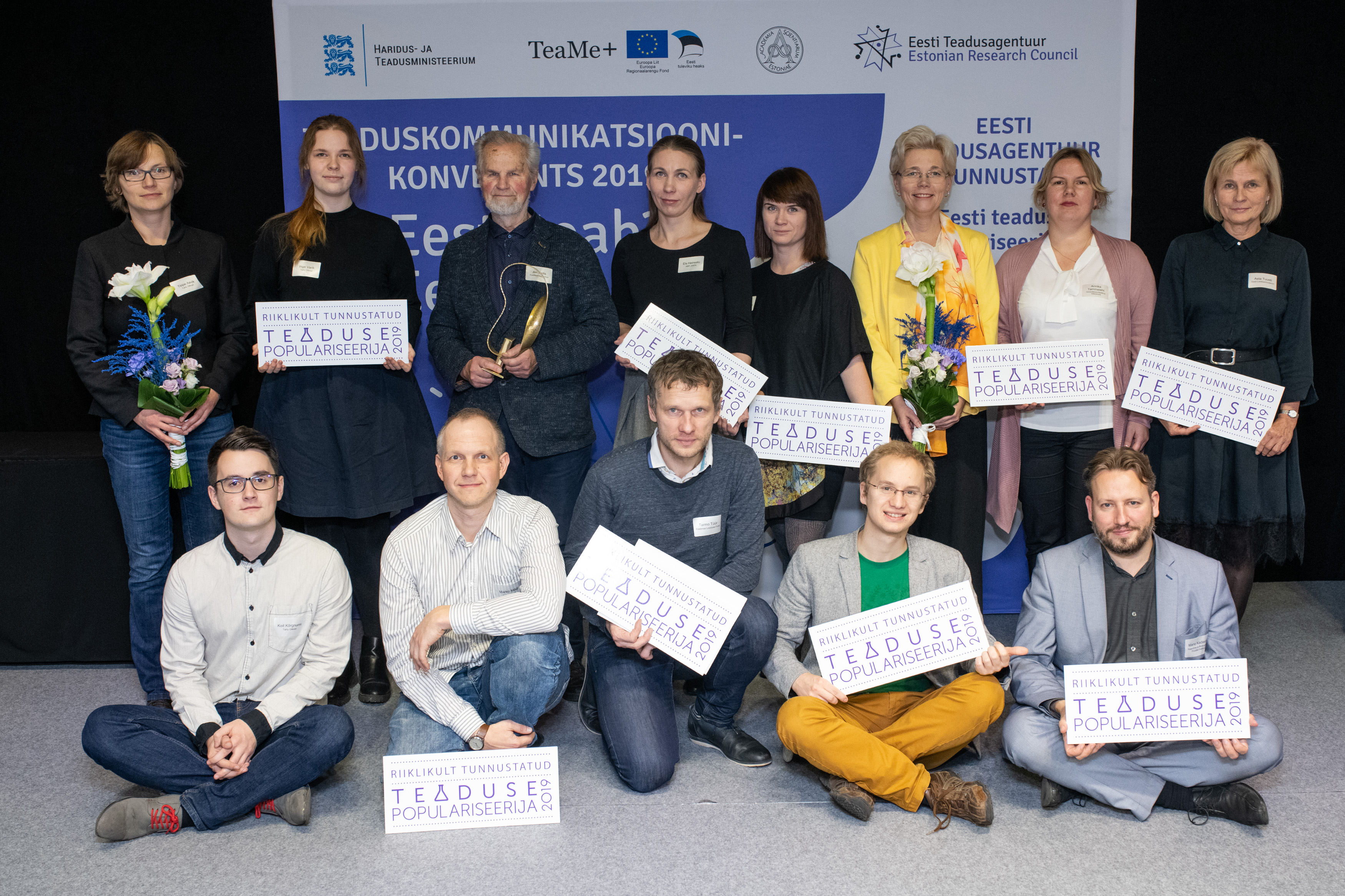 2019. a Eesti teaduse populariseerimise auhinna pälvinud